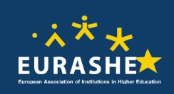 Logo der Europäischen Vereinigung der Hochschulen